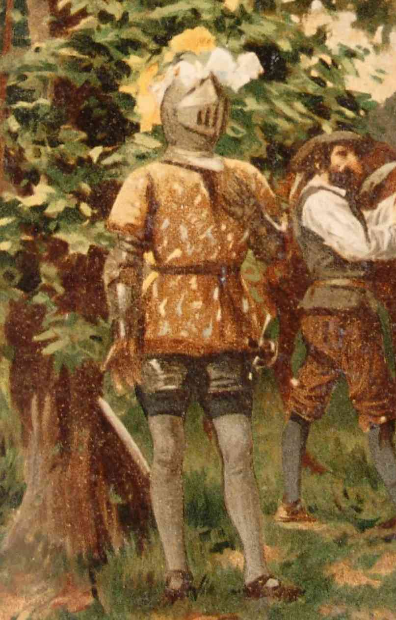 Don Quixote - Edición anotada por Nicolás Díaz de Benjumea e ilustrada por Ricardo Balaca (1880-1883) 202_162_quijote_cap14